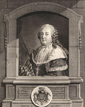 Portrait of Etienne François, marquis d'Aligre(1727-1798)